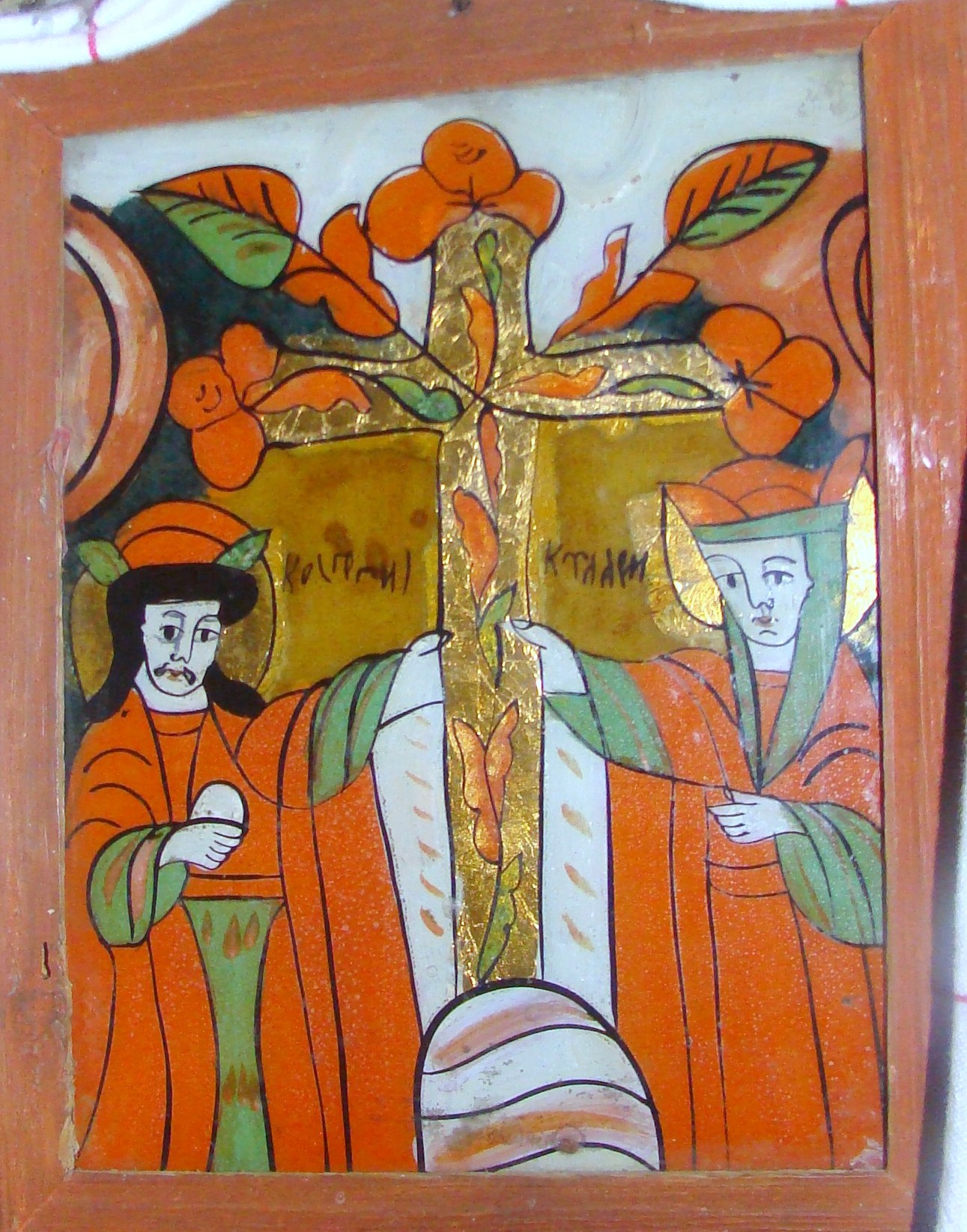 Biserica de lemn din Dângău Mare, județul Cluj